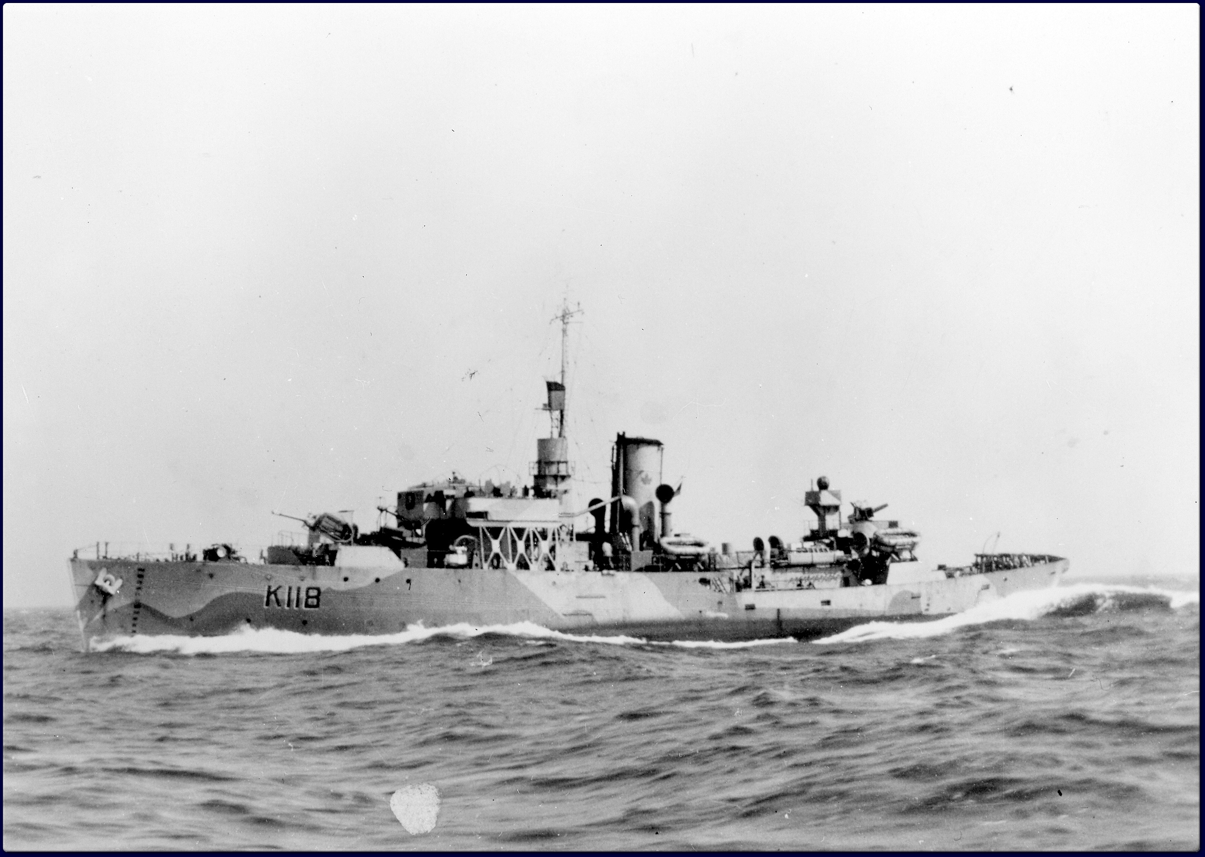 HMCS Napanee circa 1944 - 1945.